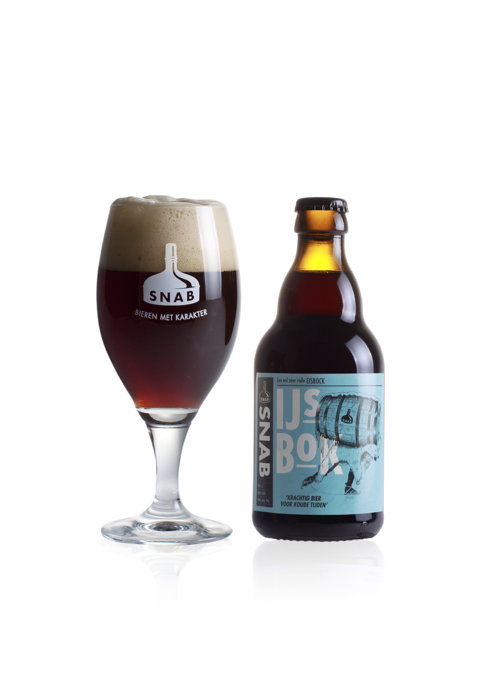 IJsbok fles & glas